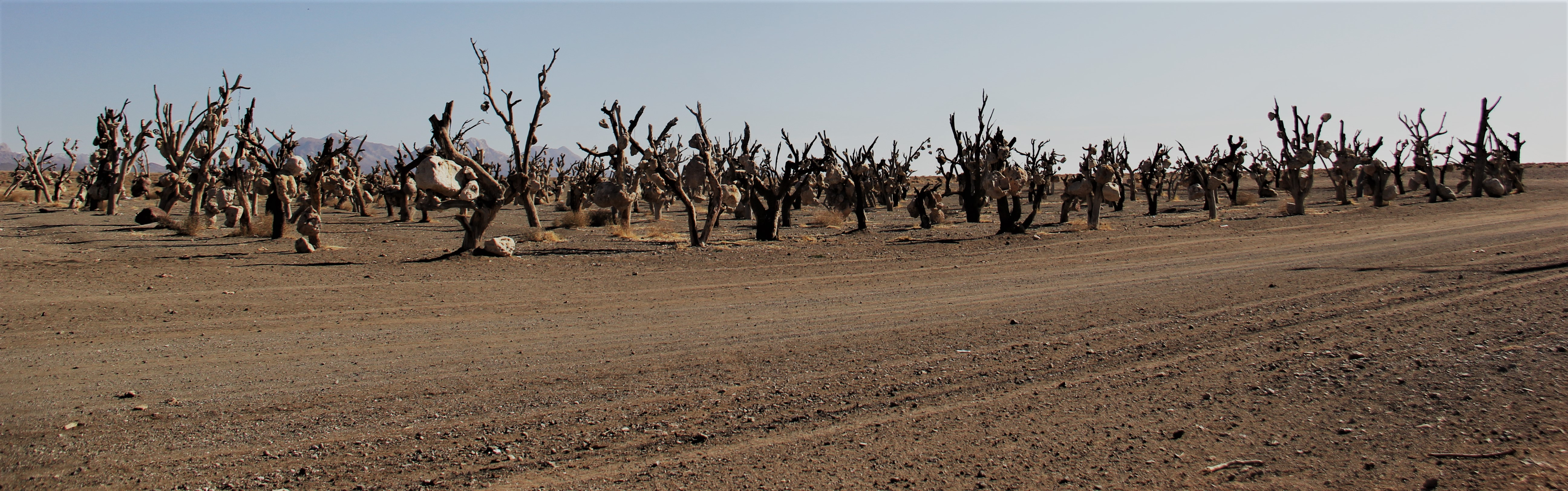 باغ سنگی